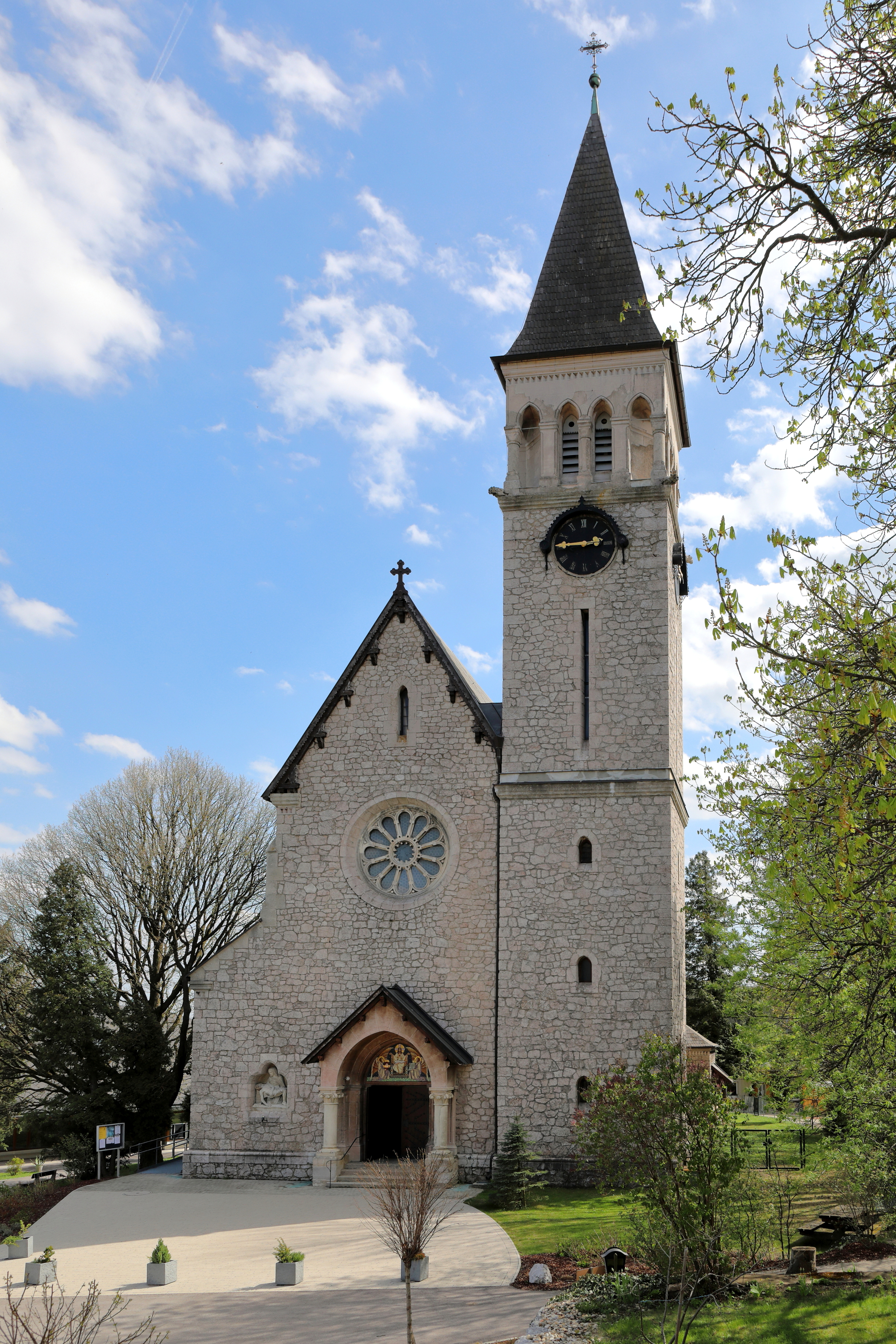 Die röm.-kath. Pfarrkirche Hl. Dreifaltigkeit in der niederösterreichischen Gemeinde Gießhübl. Eine um 1900 errichtete Basilika mit Heimatstilelementen und einem seitlich vorgestellten Nordturm.